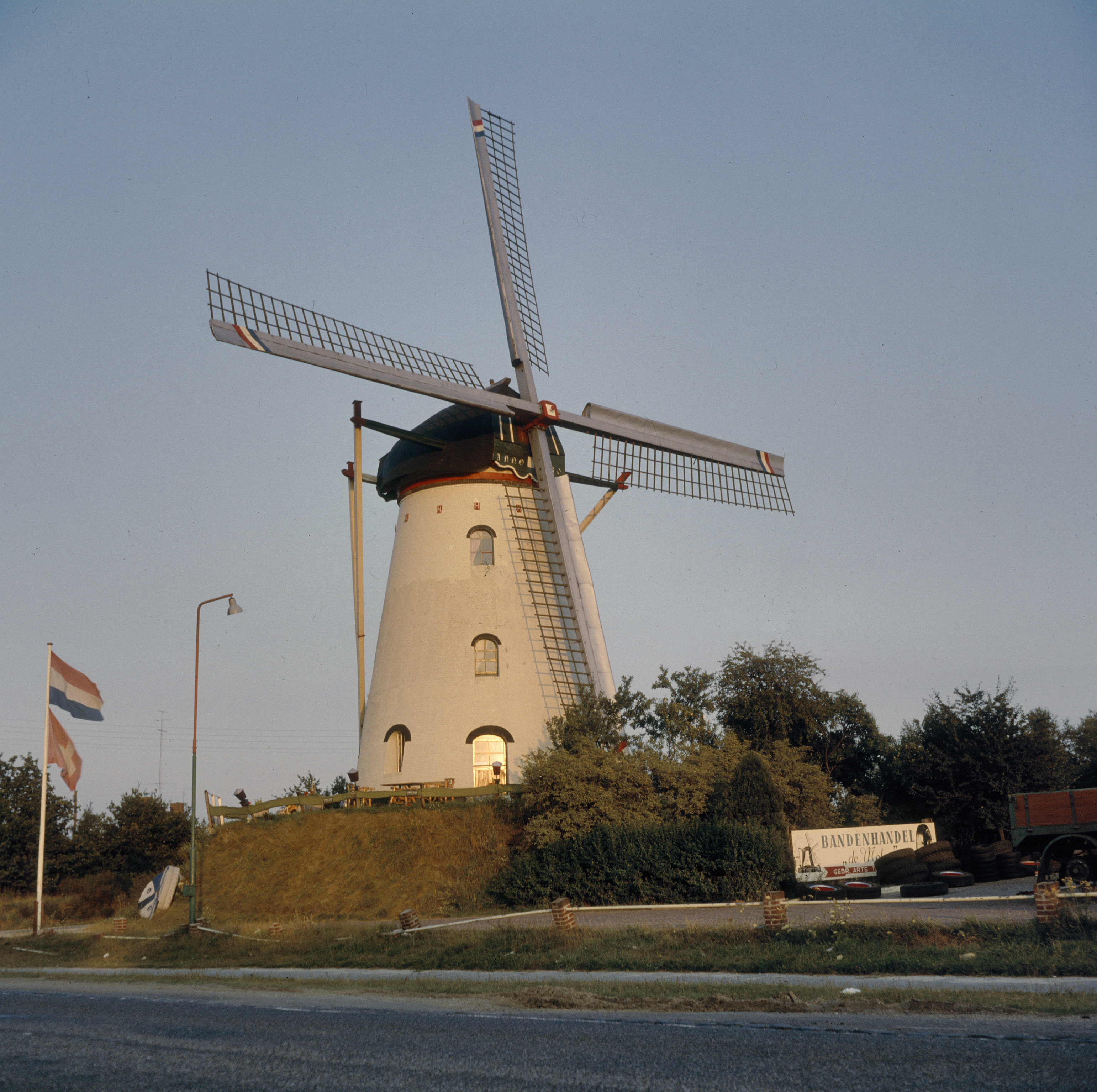 De Hellemolen: Overzicht (opmerking: Diacollectie Molens)